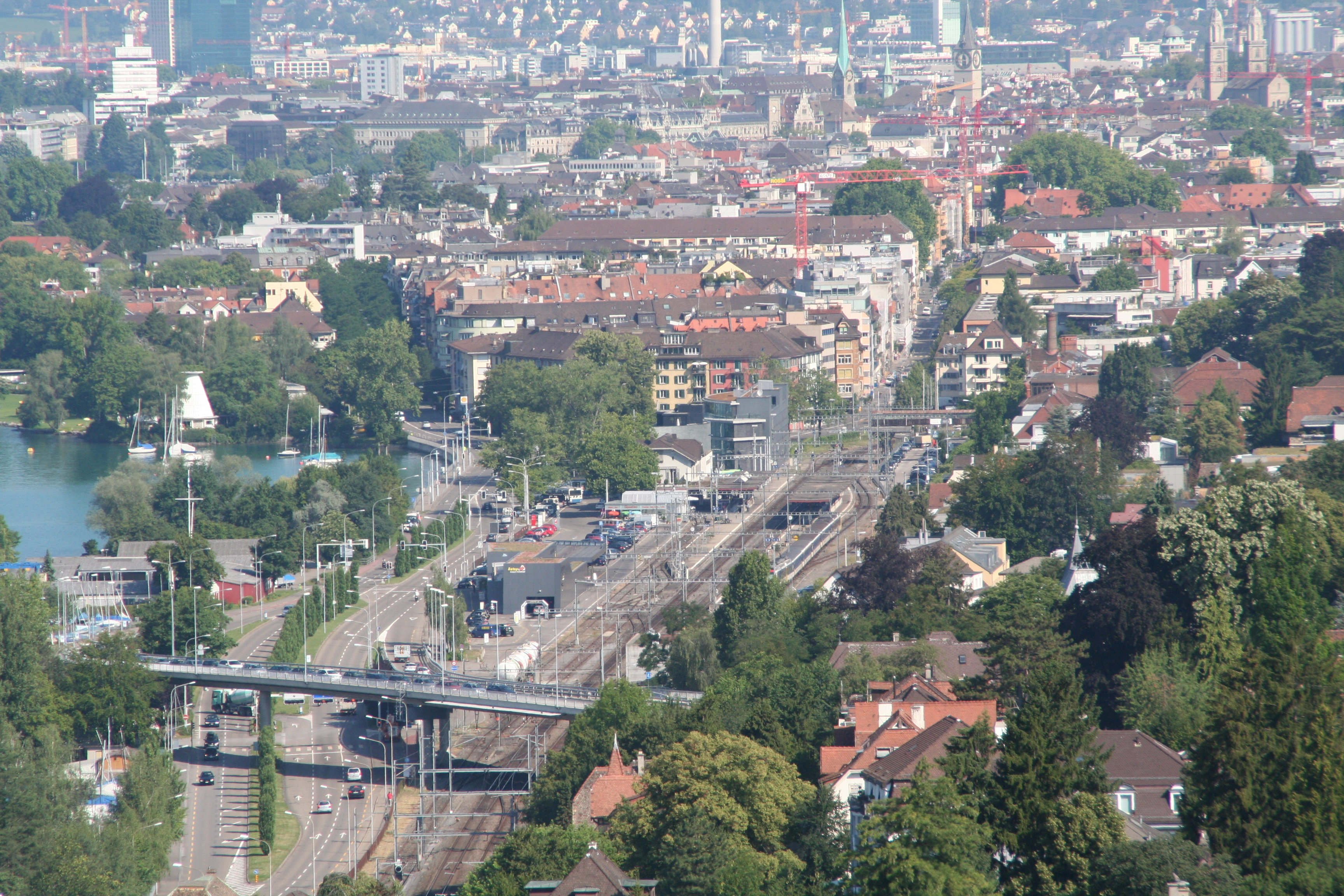 Bahnhof Tiefenbrunnen